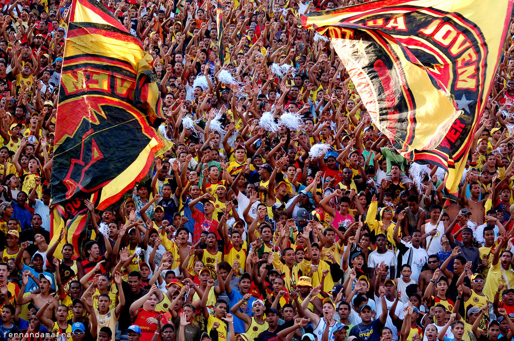 Torcida Jovem do Sport no jogo Sport 5x0 Figueirense.